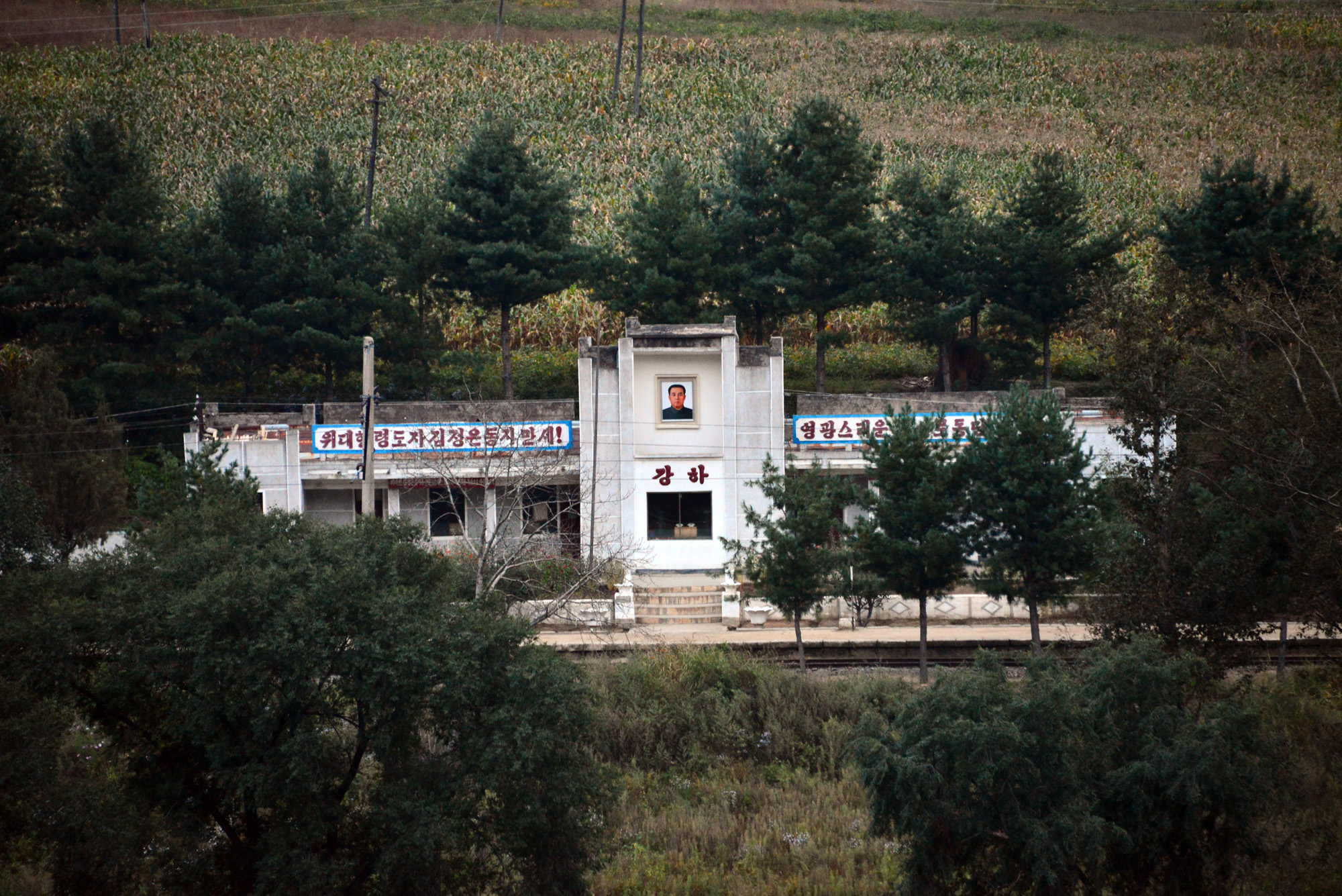 两江道江下站